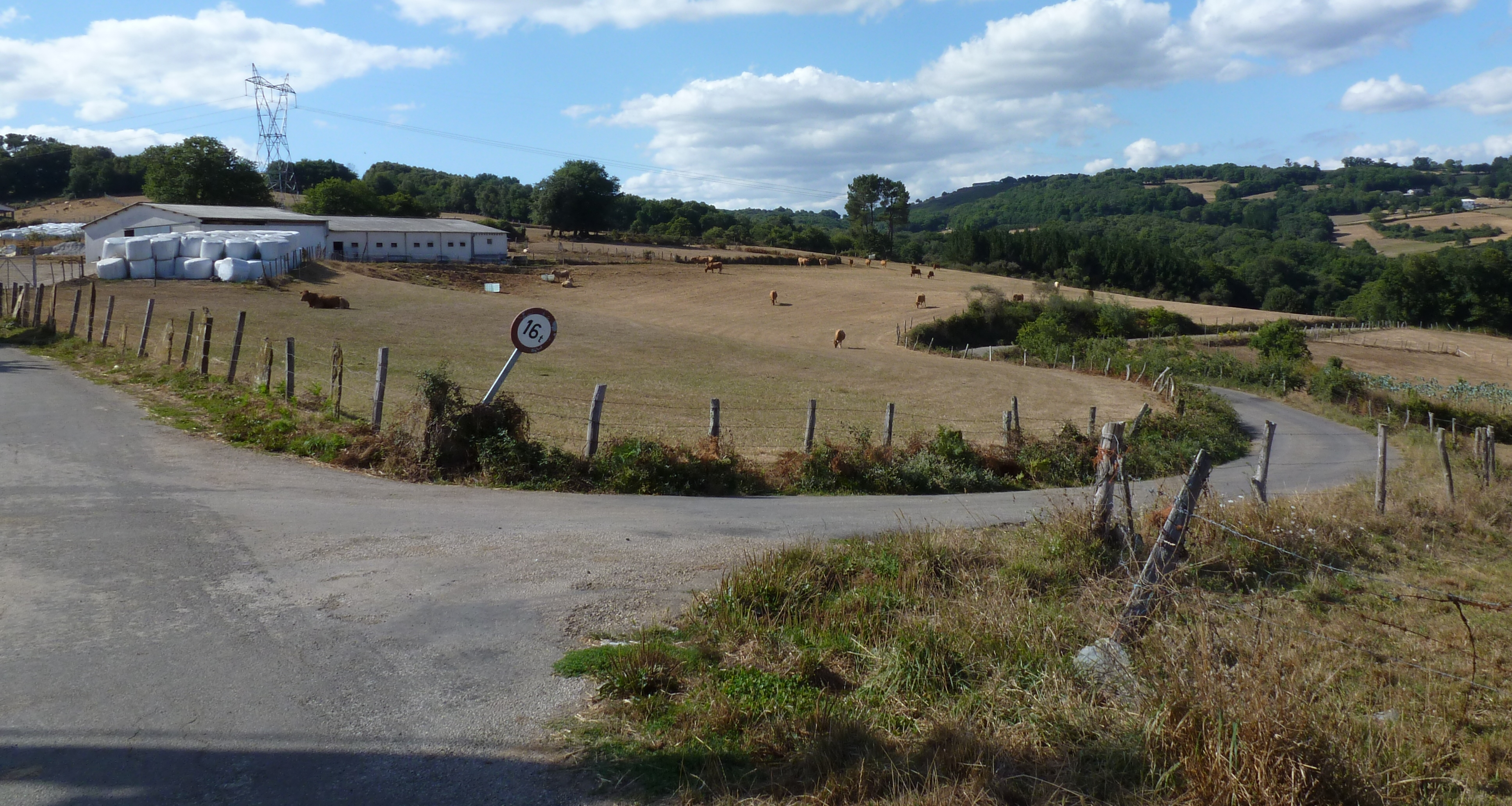 Explotación gandeira en Fruxil, parroquia da Cervela, concello do Incio, Lugo